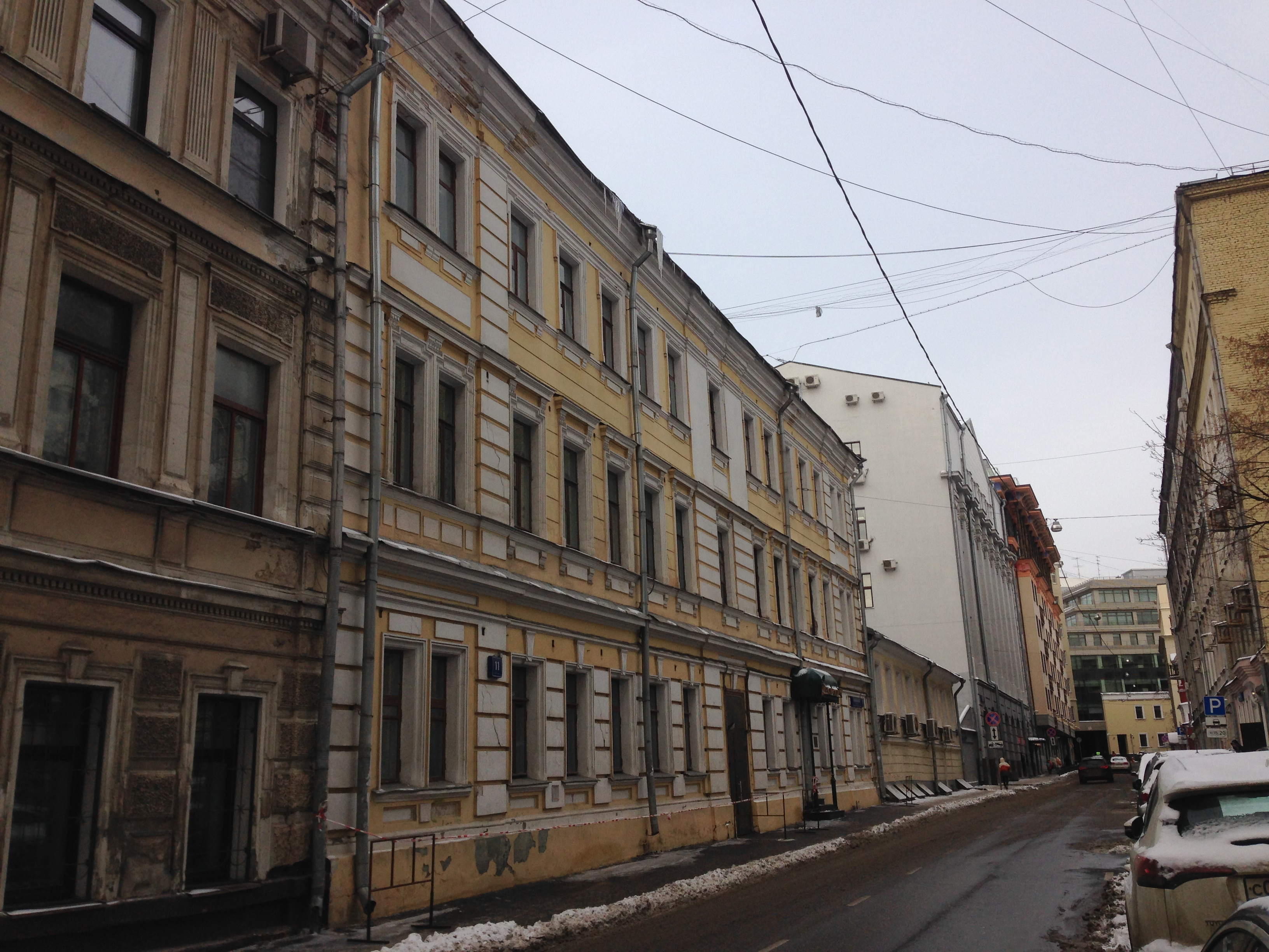 Здание общежития Московского университета в Филипповском переулке (вид слева)